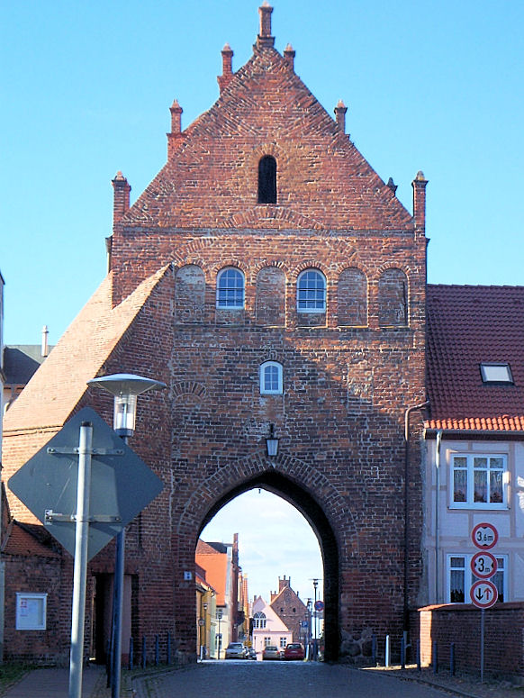 Tribsees, Blick durch das Steintor zum Mühlentor